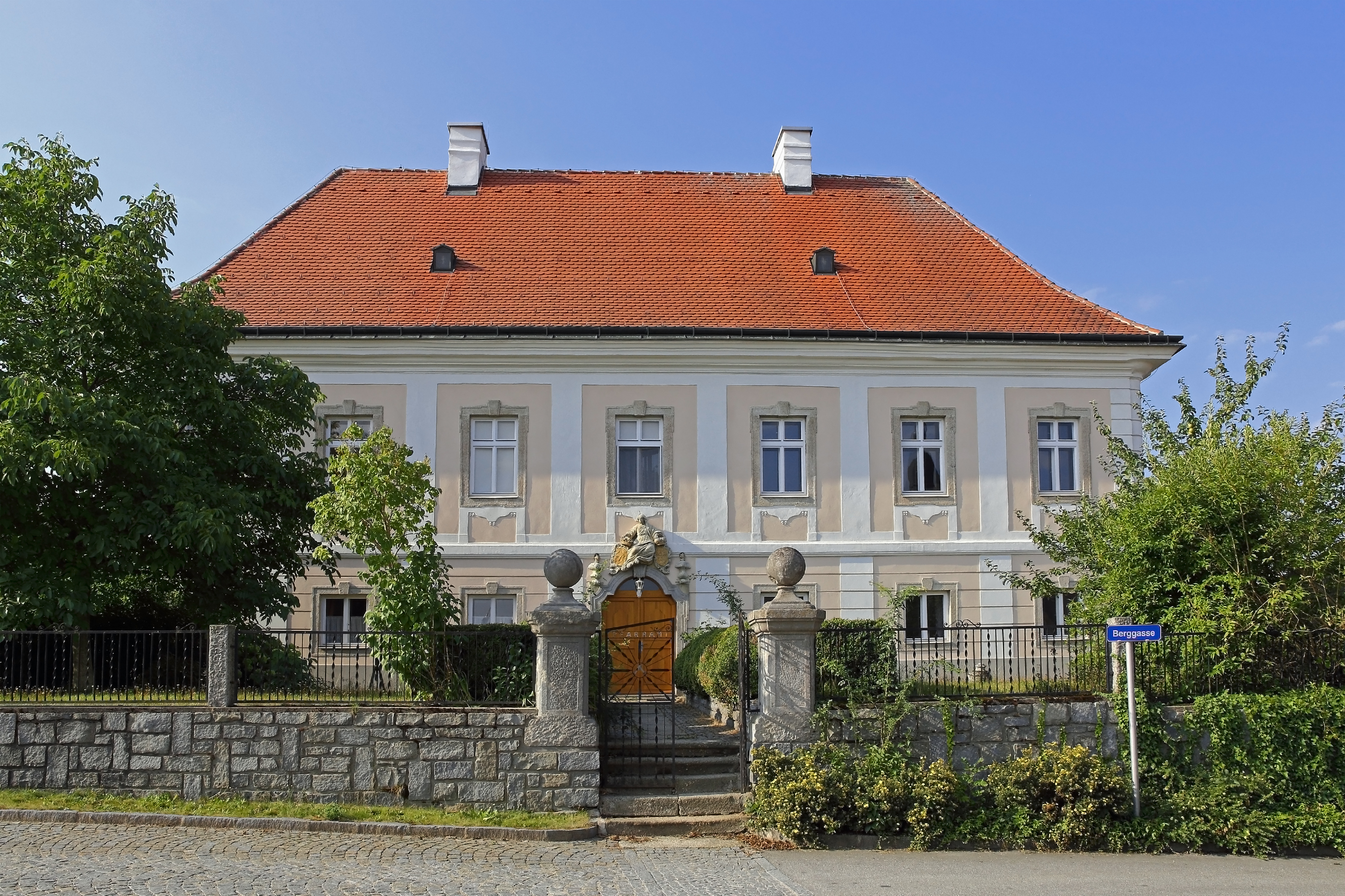 Der barocke Pfarrhof wurde 1741 erbaut.